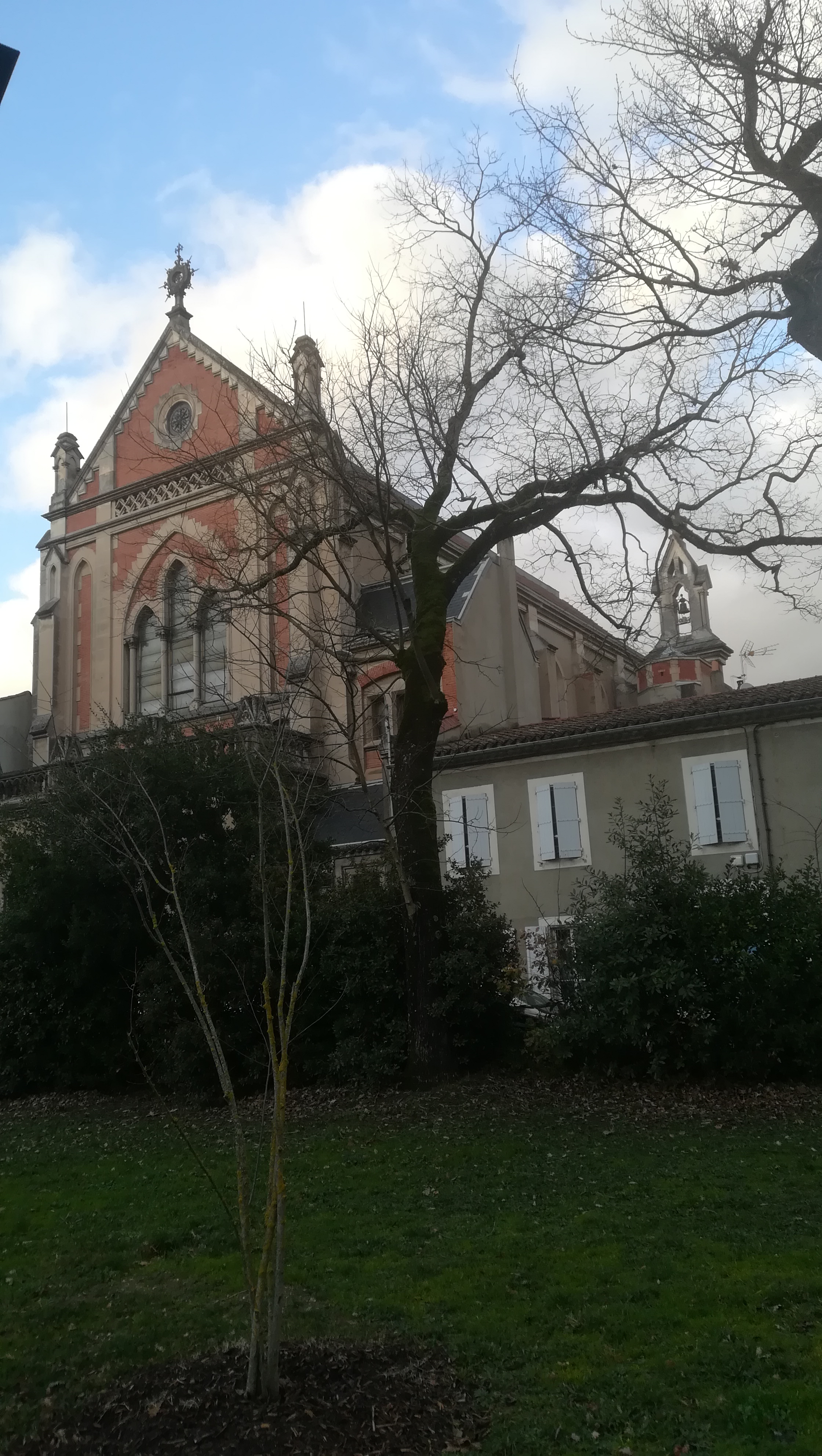 Chapelle du couvent du Saint-Sacrement à Castres, jardin du Mail